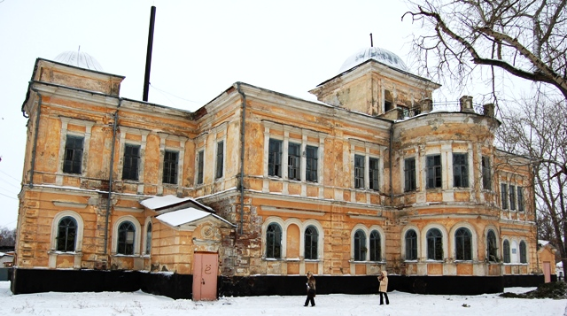 оранжевый дом